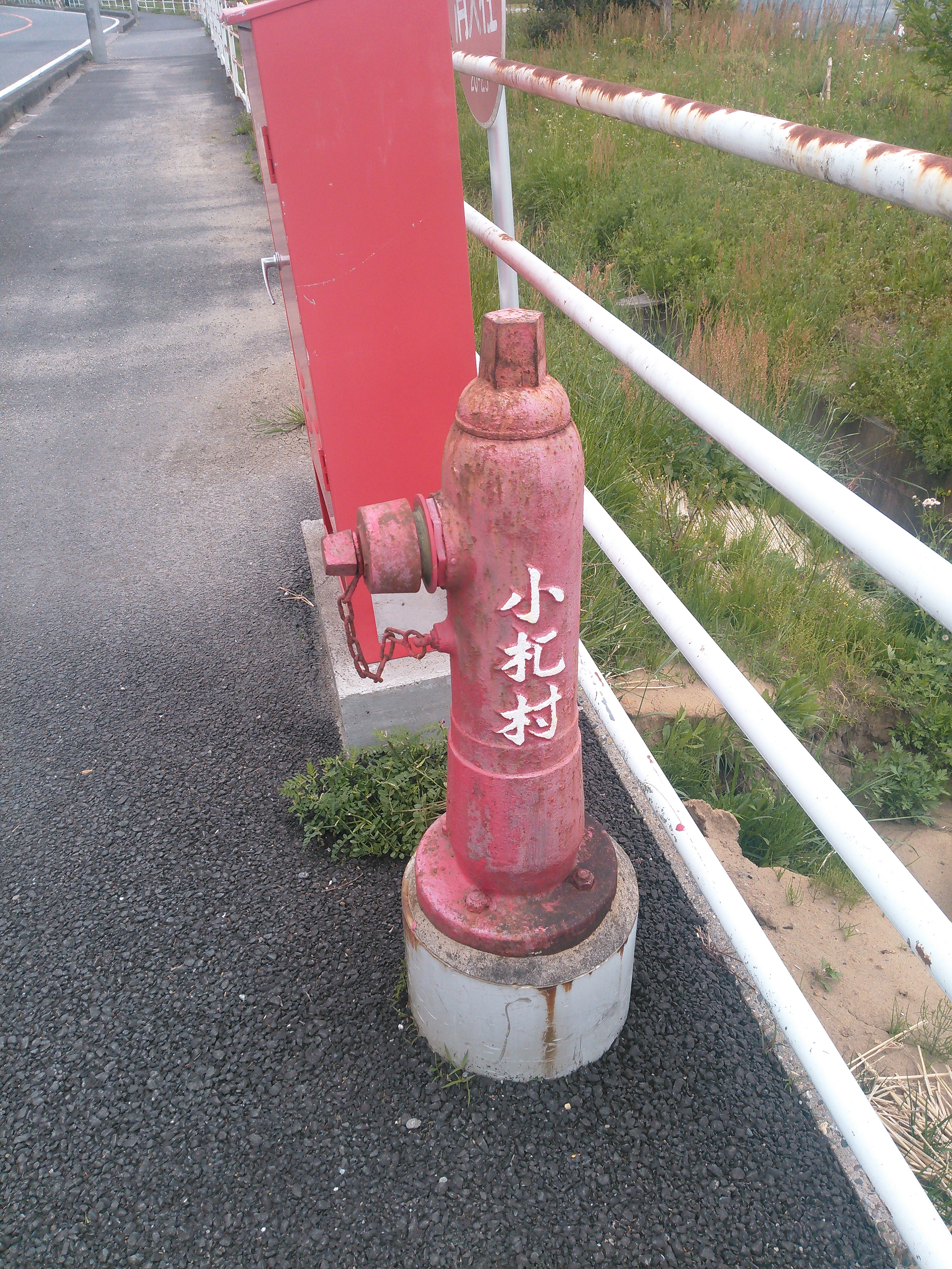 千葉県君津市。旧小櫃村の名が残る消火栓